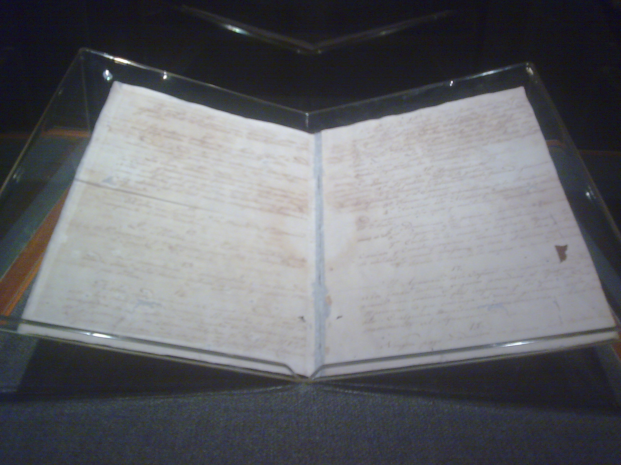 Reglamento Provisorio Constitucional de la Provincia Libre de Guayaquil exhibida en el Museo Municipal de Guayaquil.